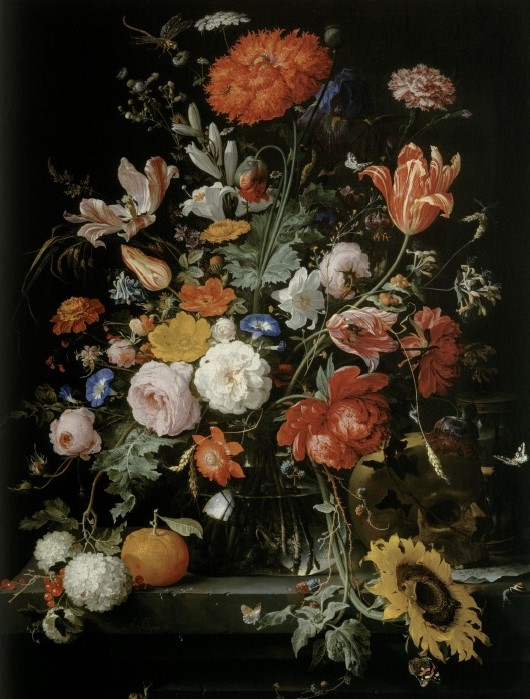 Arrangement von Blumen mit Sonnenblume, Sanduhr und Schädel (Vanitas).